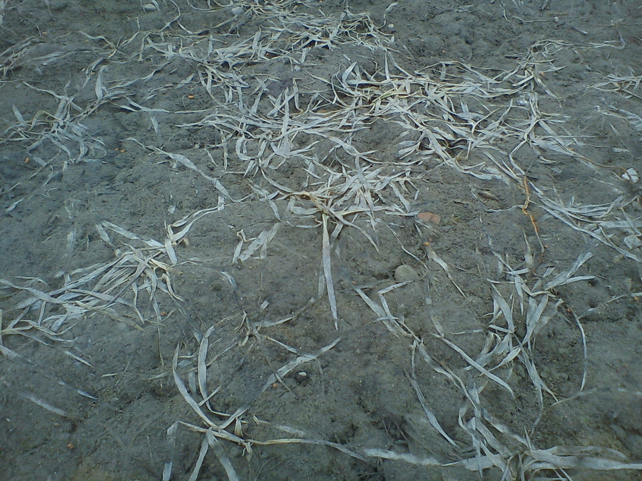 Wymakanie pszenicy ozimej